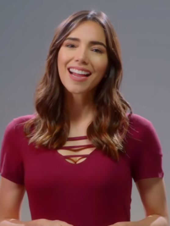 Alejandra Villafañe en anuncio institucional de la TDT Colombia